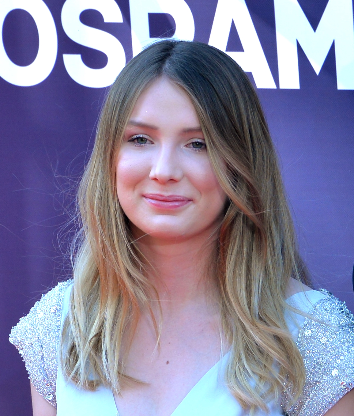 Бельгійська співачка Бланш на церемонії відкриття Євробачення 2017 у Києві